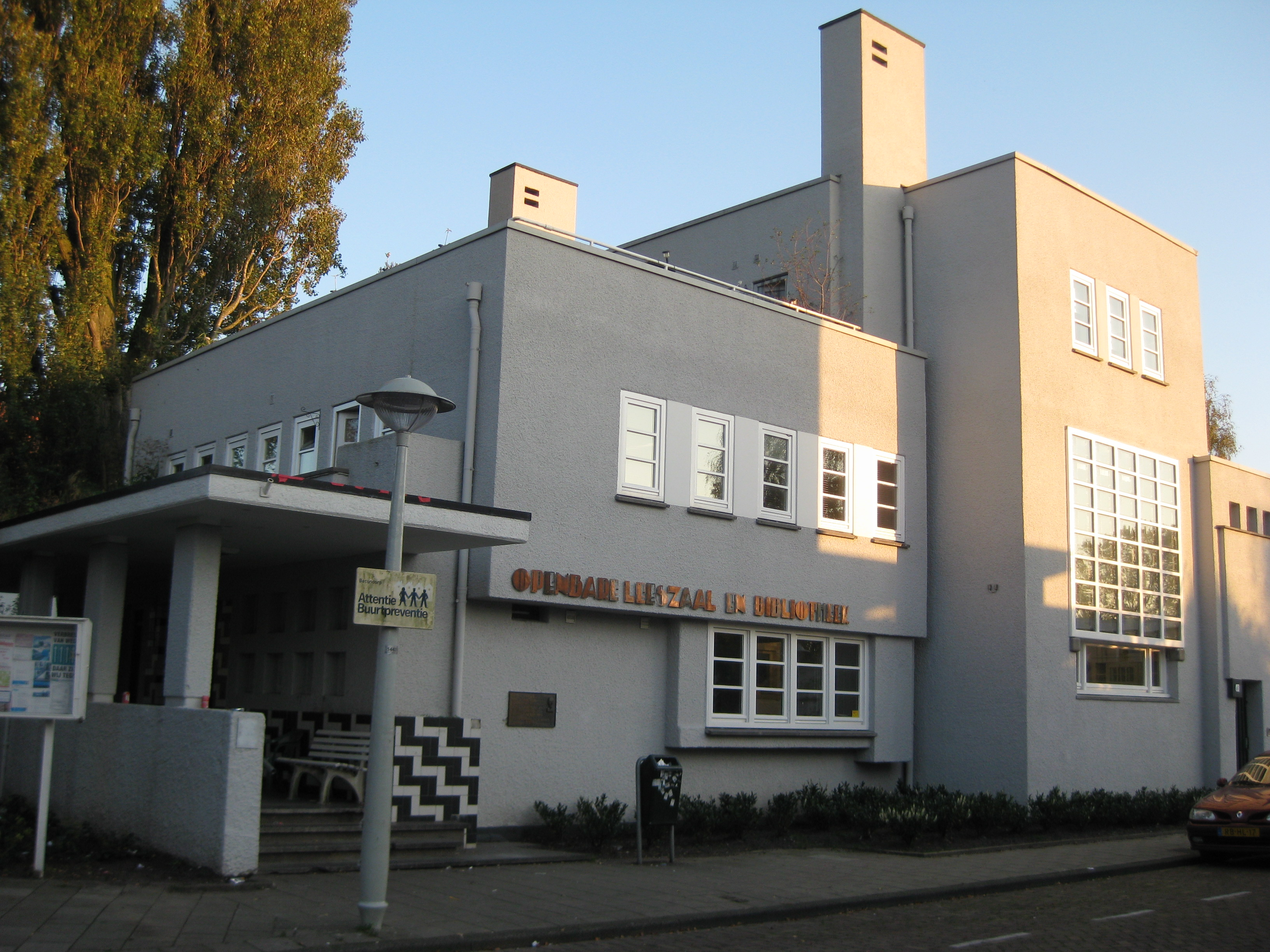 De Bibliotheek, ontworpen door Dick Greiner, Brink 43 Amsterdam